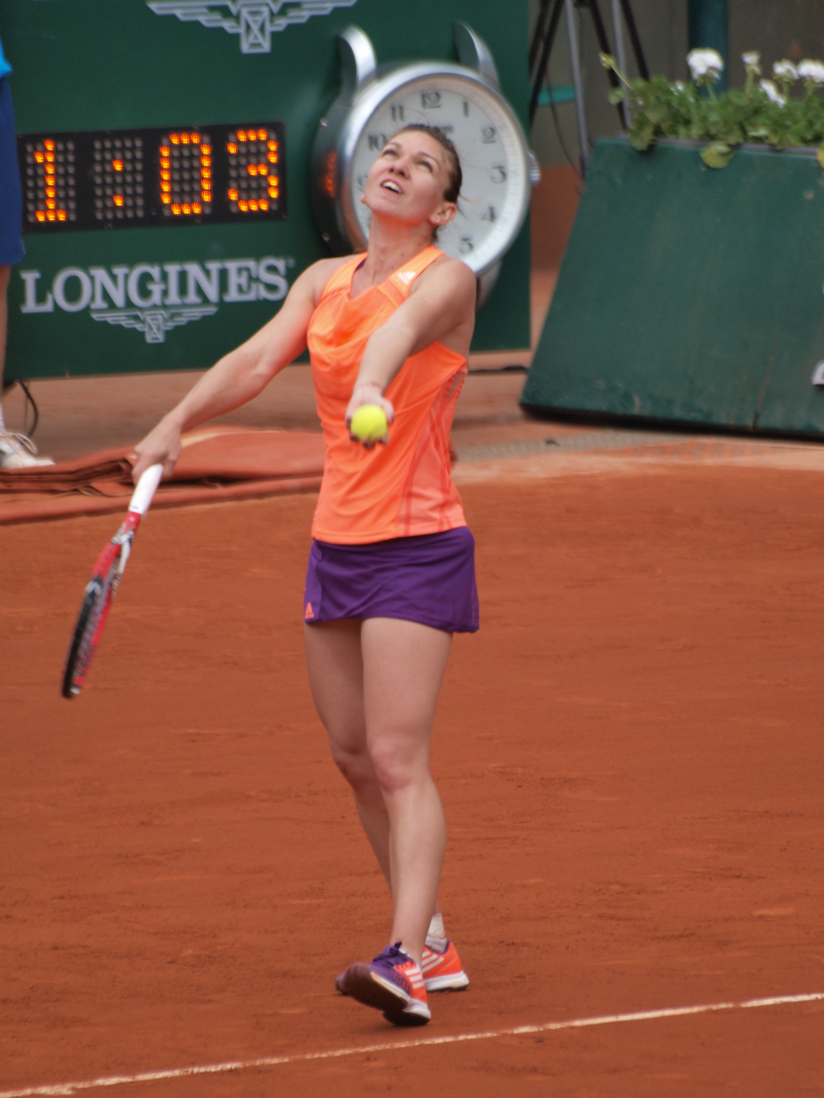 Internationaux de France de tennis, le 2 juin 2014, sur le court Philippe Chatrier : Simona Halep